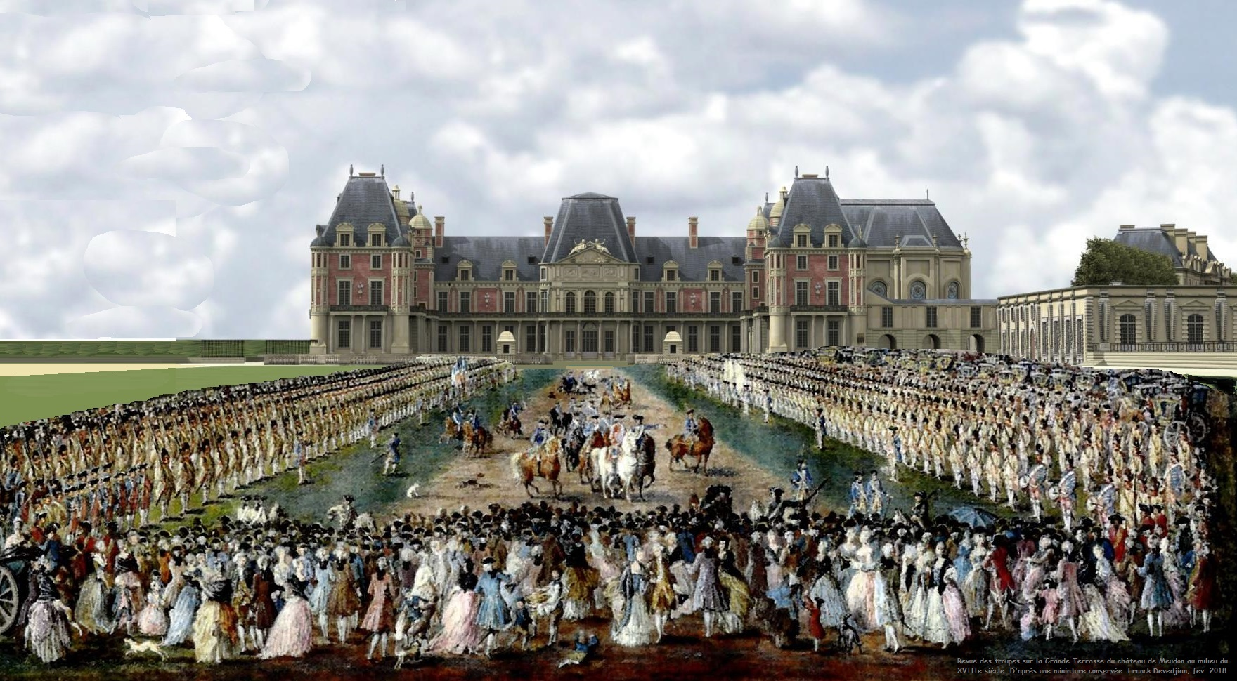 Schéma restituant la revue des troupes sur la Grande Terrasse du château de Meudon, au milieu du XVIIIe siècle.